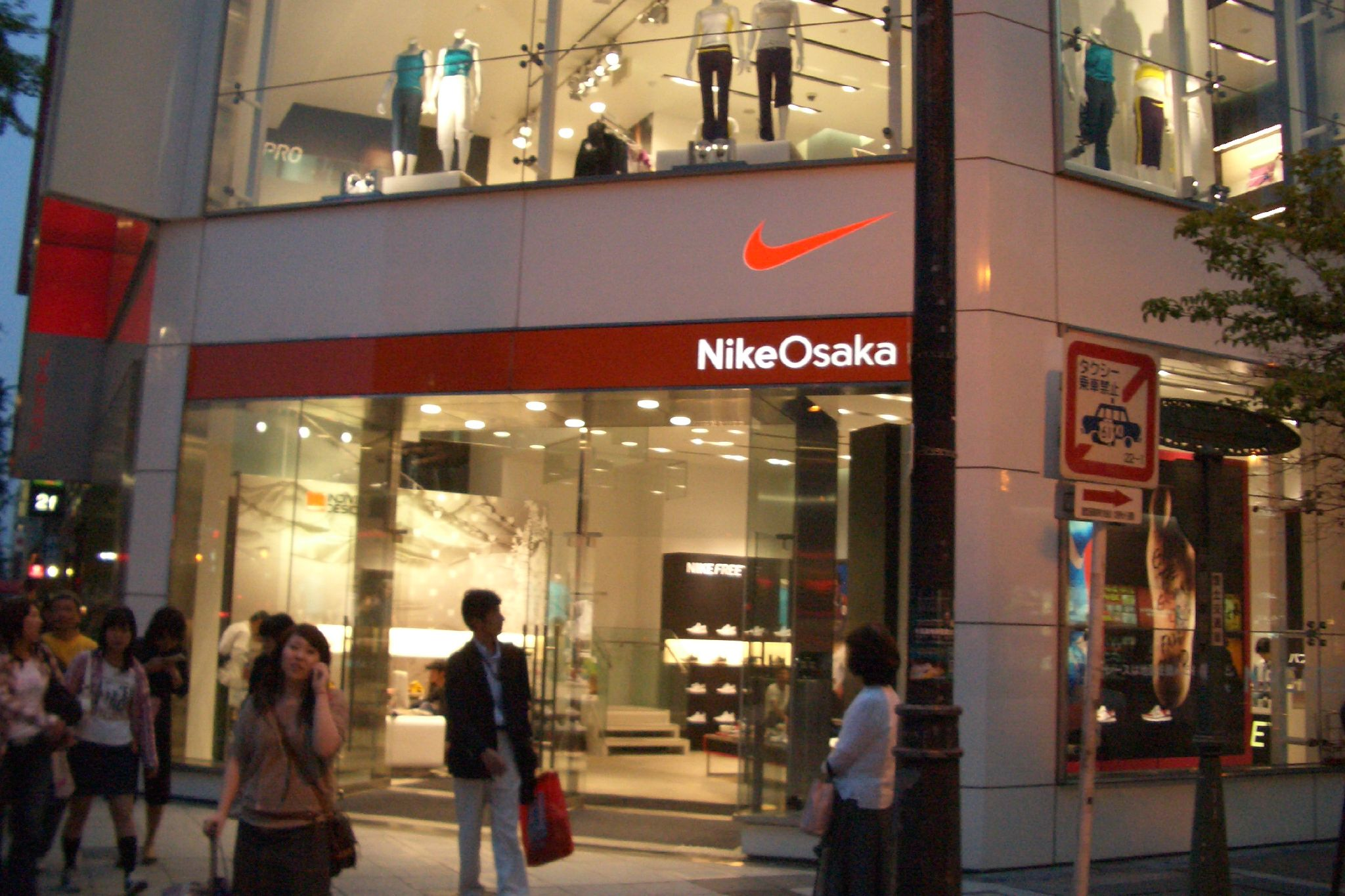 Tienda Nike en Osaka (Japón)